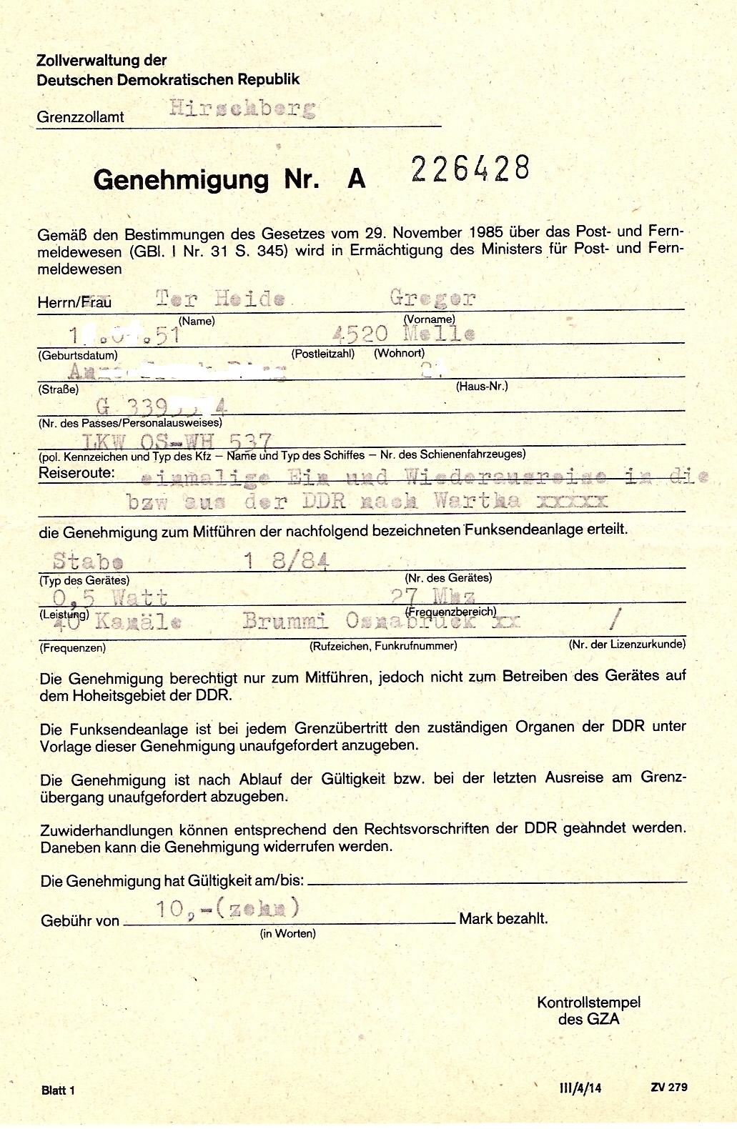 CB-Funk Gen. zum Transit mit dem LKW durch die DDR